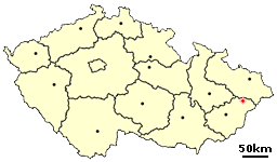 Zubří (okres Vsetín) na mapě České republiky